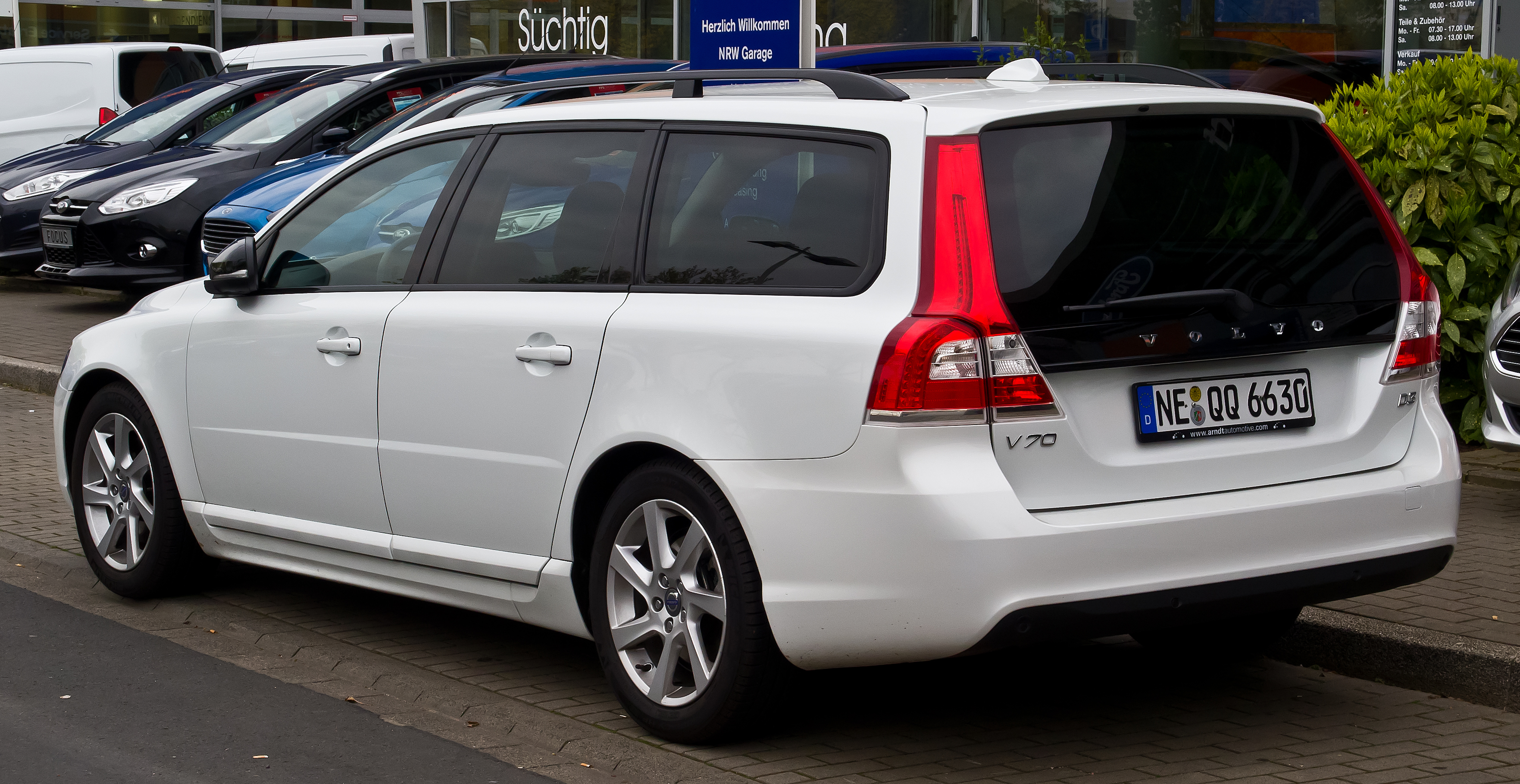 Volvo V70 D3 Linje Svart